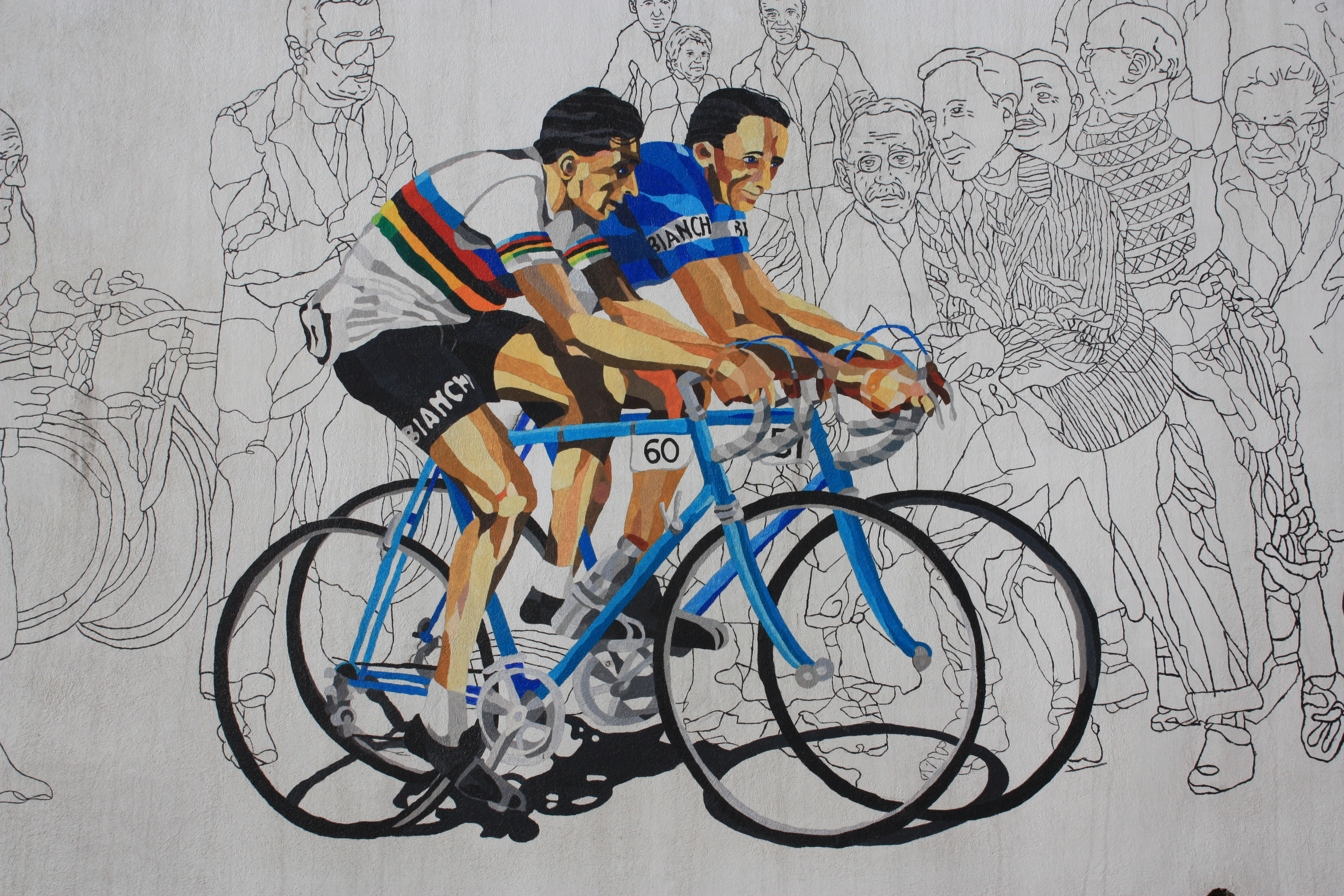 Murales a Castellania (AL) dedicato a Fausto e Serse Coppi.